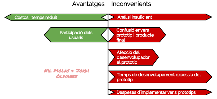 Taula on mostra gràficament els avantatges i inconvenients que té utilitar aquest tipus de modelatje.